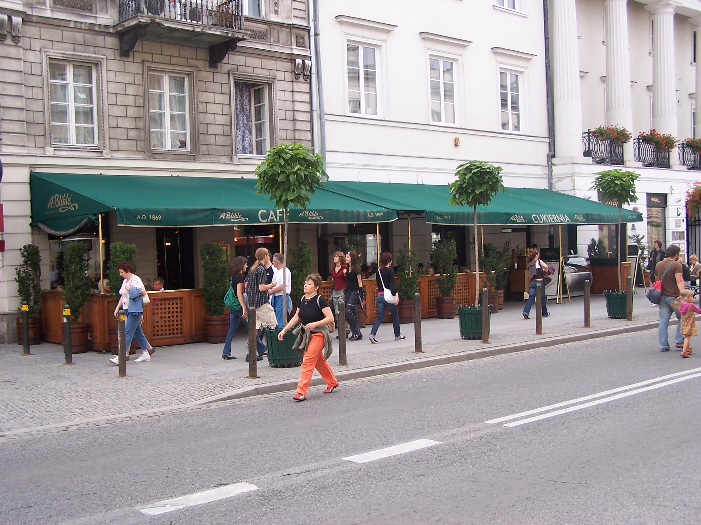 Photo by Piotrus. Blikle.